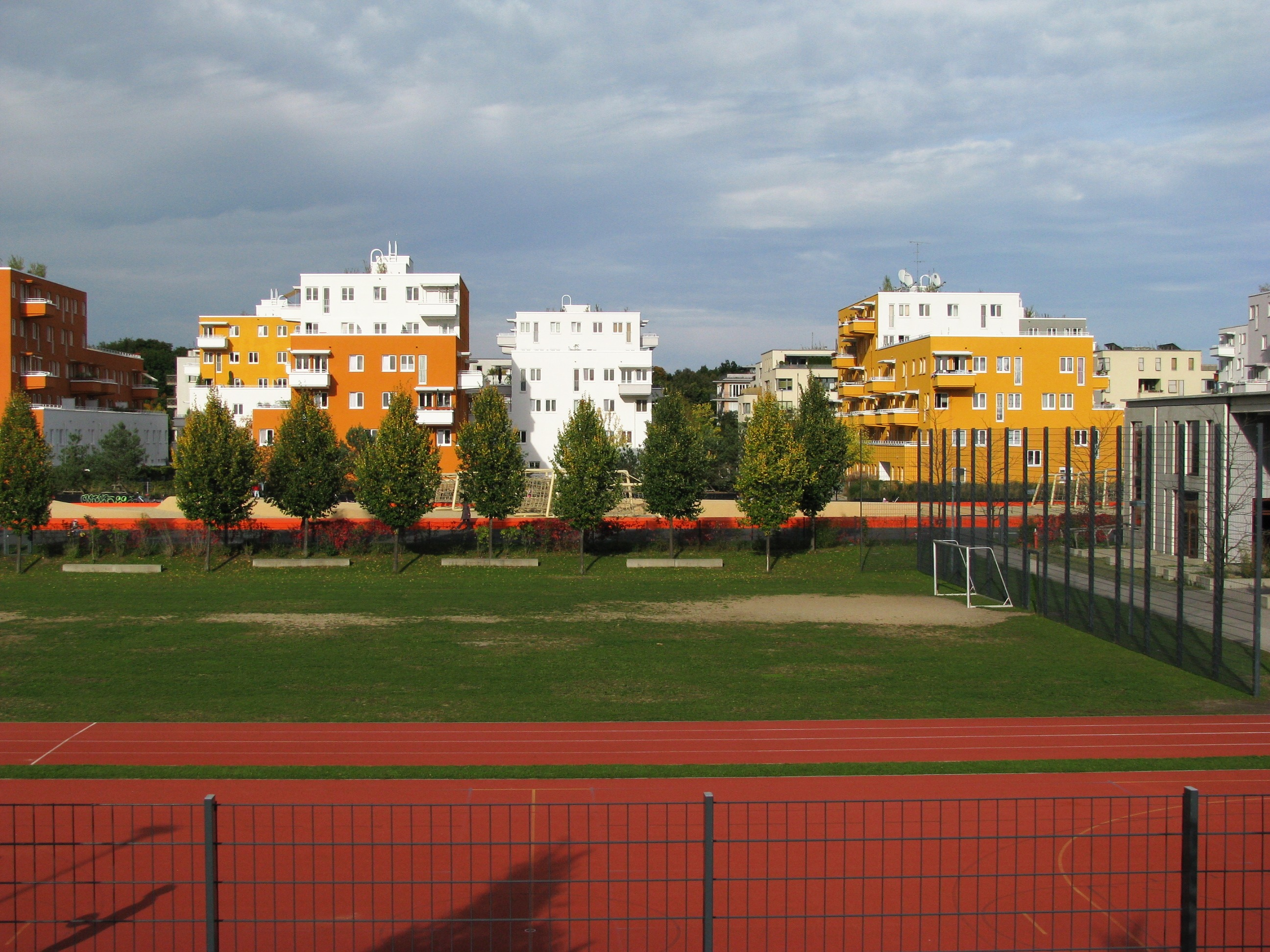 Neubauviertel Theresienhöhe.